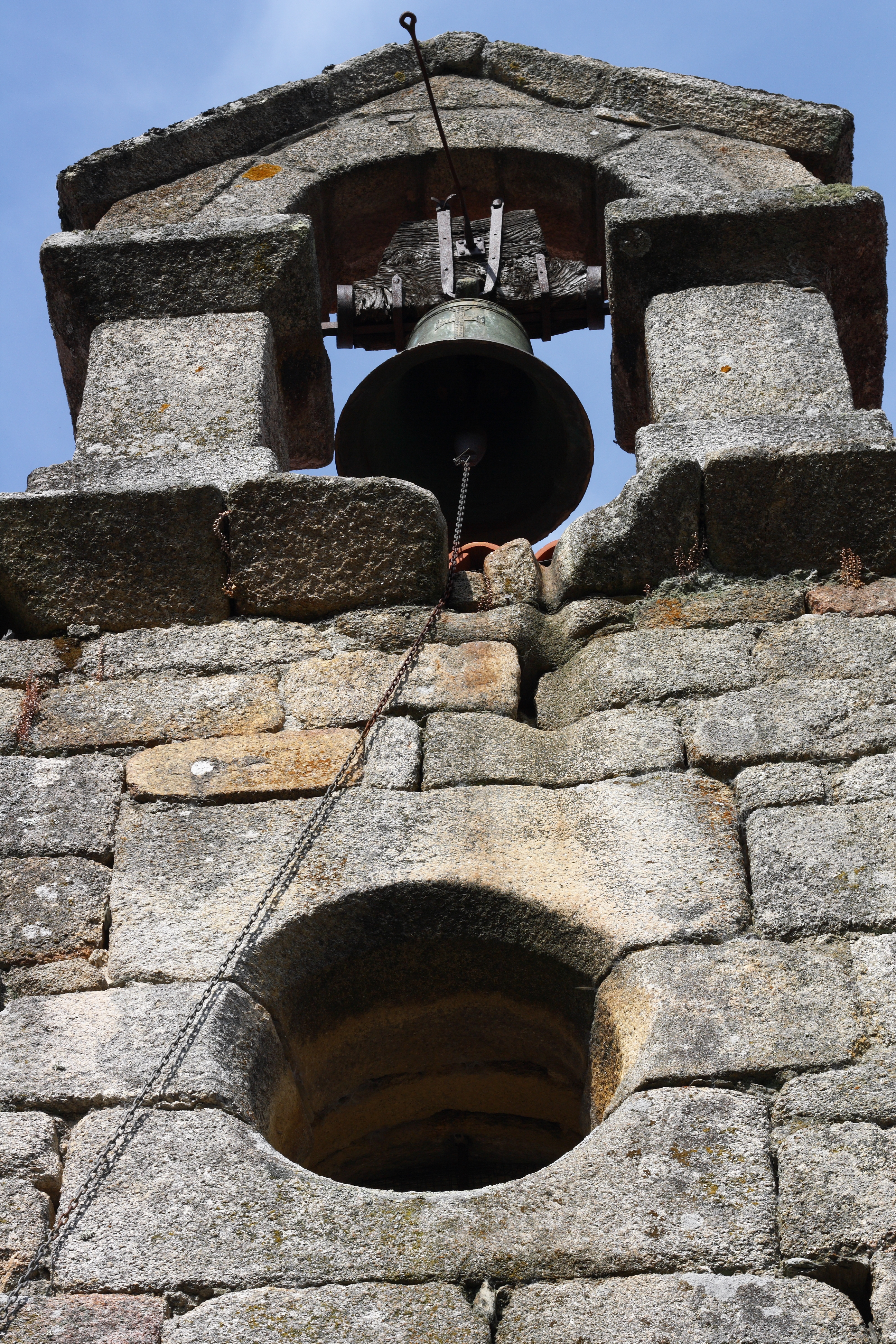 Katholische Kirche Santa María in Mixós in der Gemeinde Monterrei in der spanischen Provinz Ourense (Galicien), offener Glockenturm (espadaña)